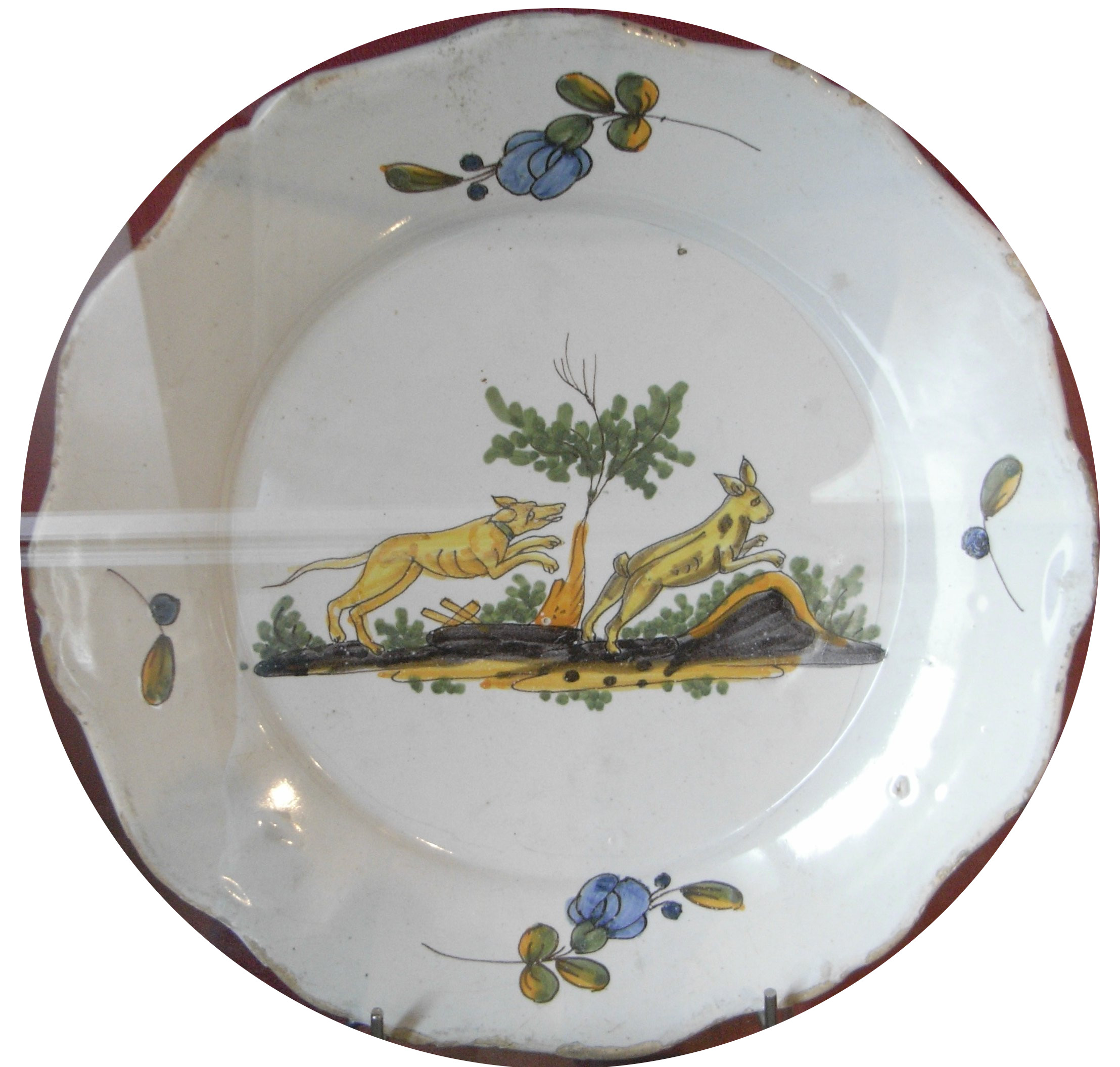 Faïence de La Rochelle du XVIII siècle représentant une chasse au lièvre avec un lévrier, exposée au musée d'Orbigny-Bernon à La Rochelle (Charente-Maritime - France)